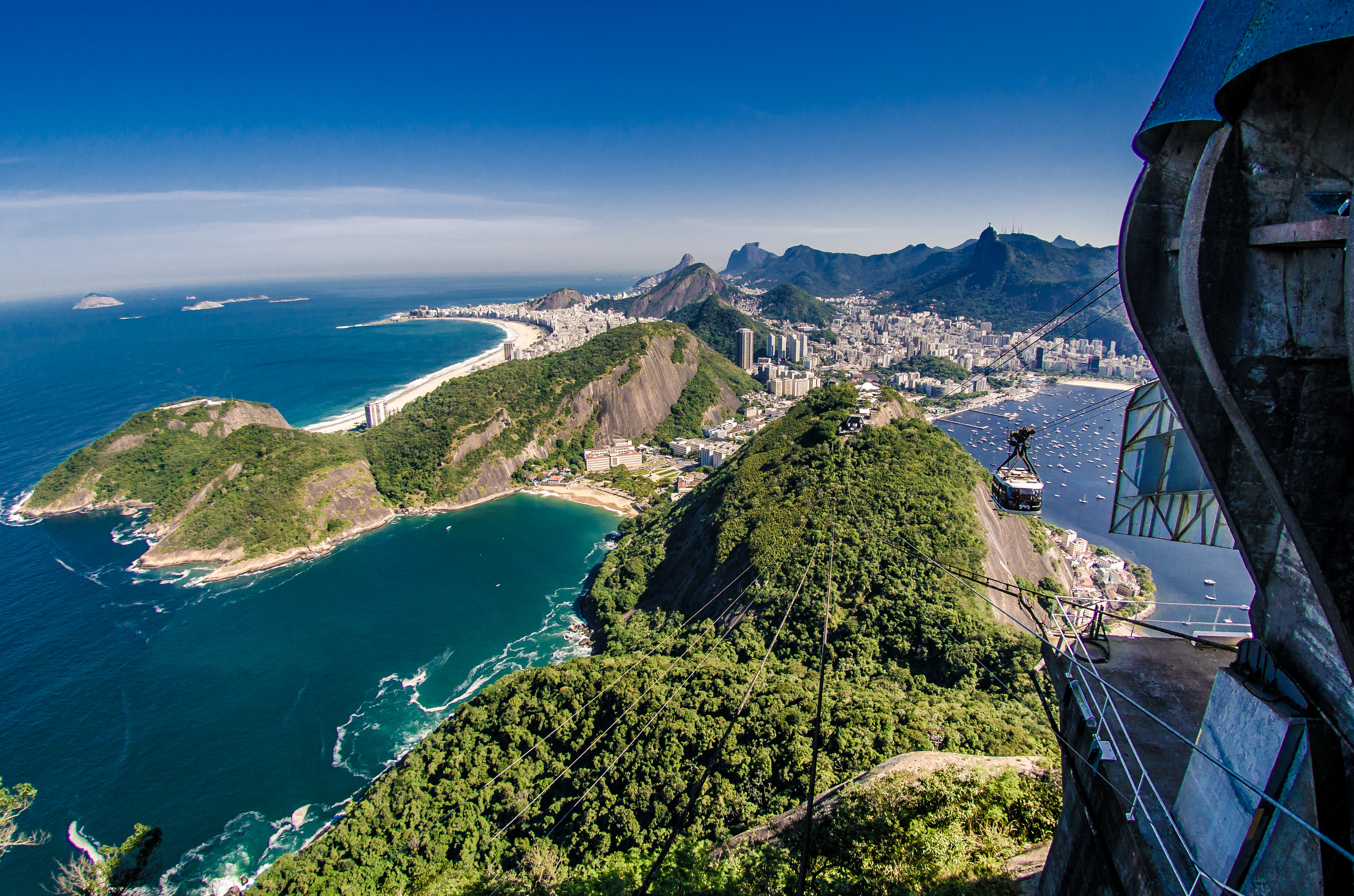 Praia Vermelha localizada no bairro da Urca na cidade de Rio de Janeiro. Do alto do Pão de açúcar, é possível ter essa visão da praia, uma paisagem realmente muito bela.